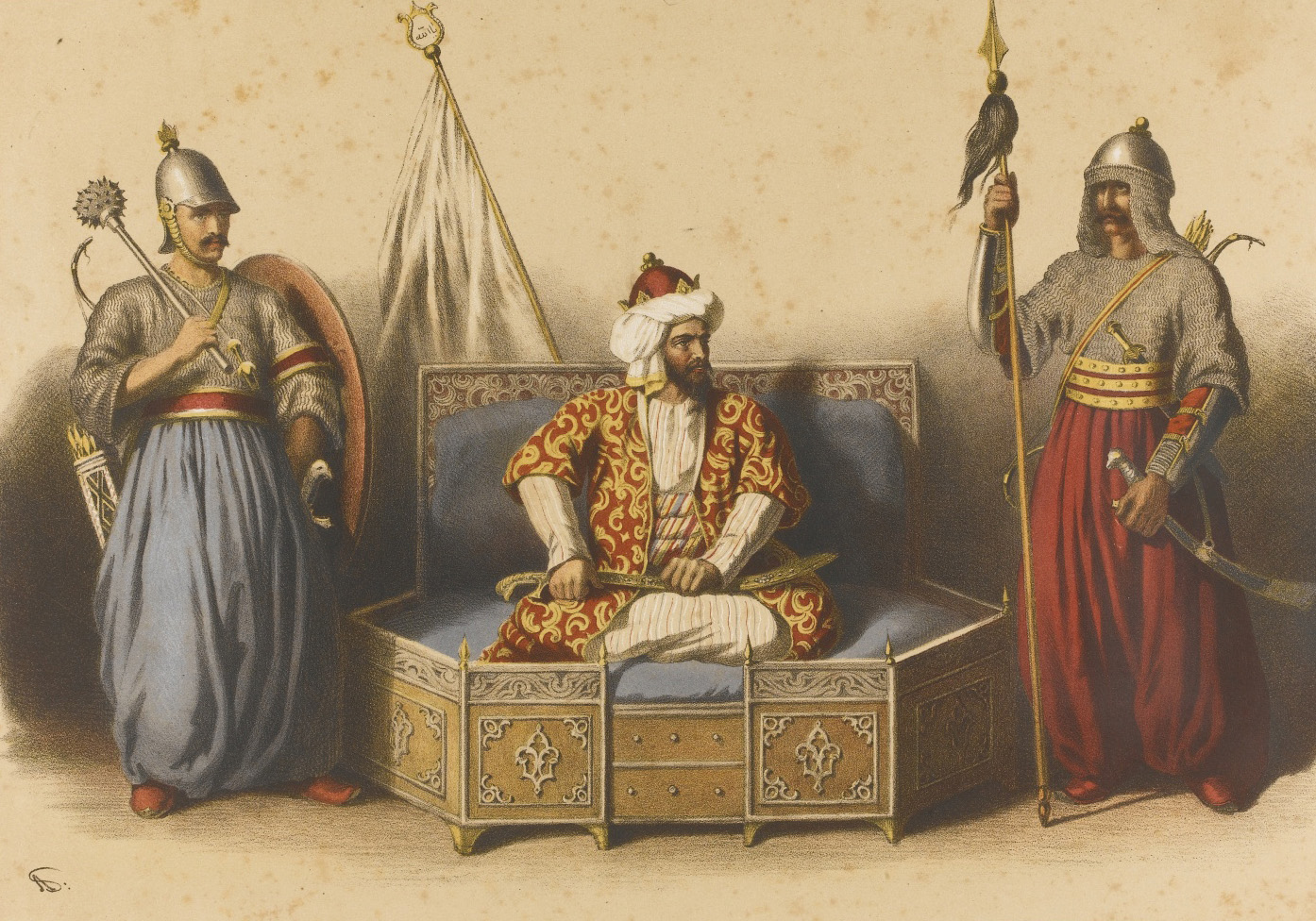 Arif Paşa tarafından çizilen ve Osman Bey ve Osmanlı devlet görevlilerini tasvir eden bir resim